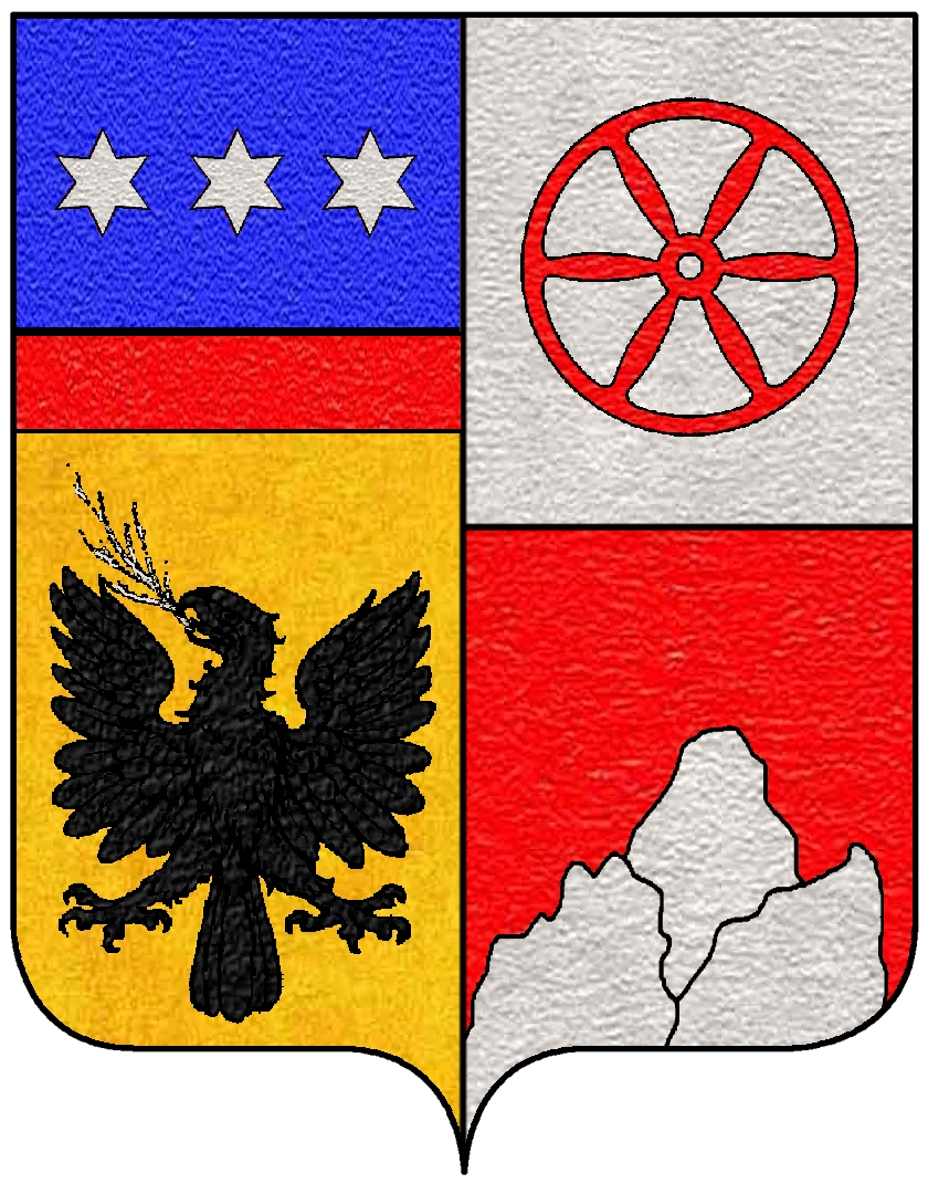 Stemma della famiglia Arisi Rota